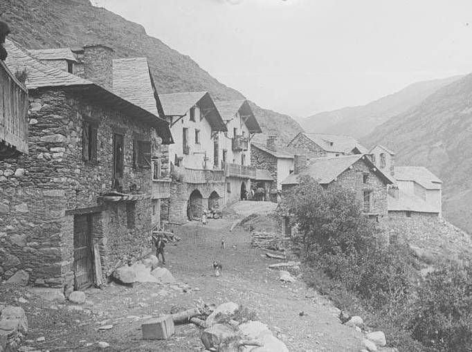 Imatge